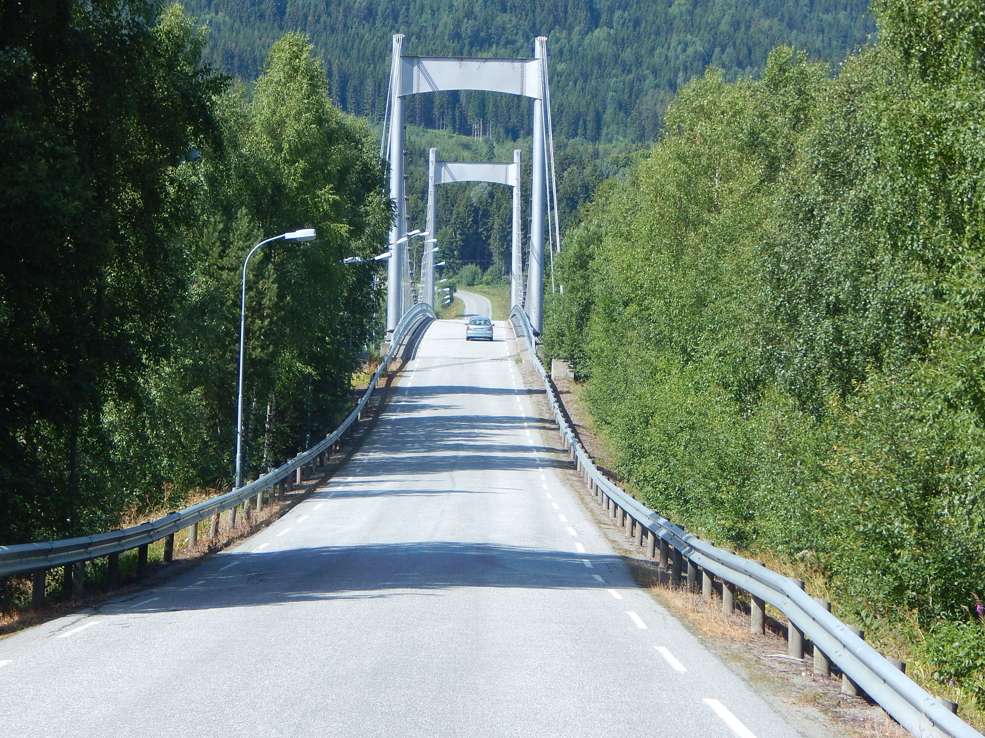 Fylkesvei 139 over Fluberg bru